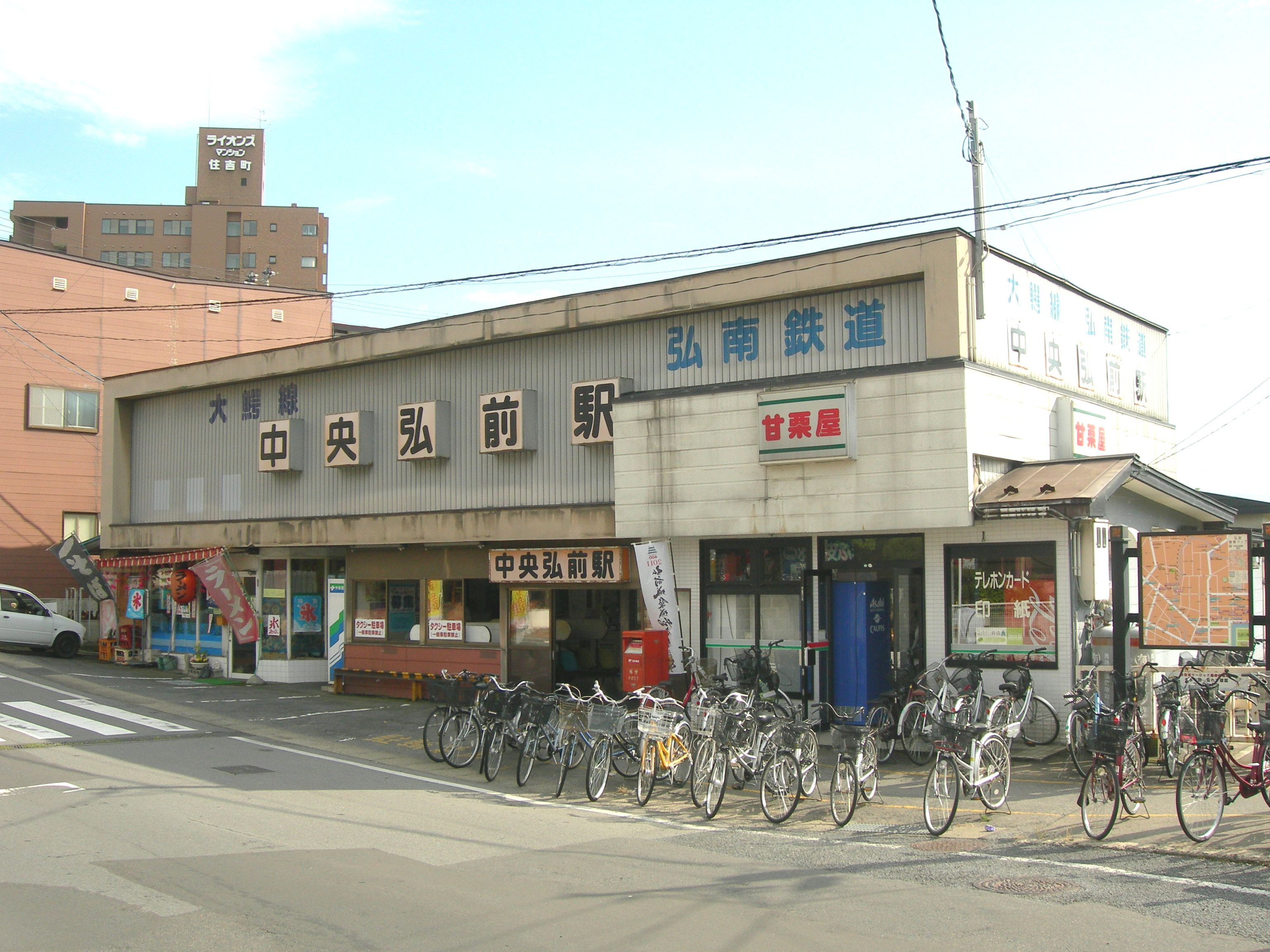 弘南鉄道中央弘前駅